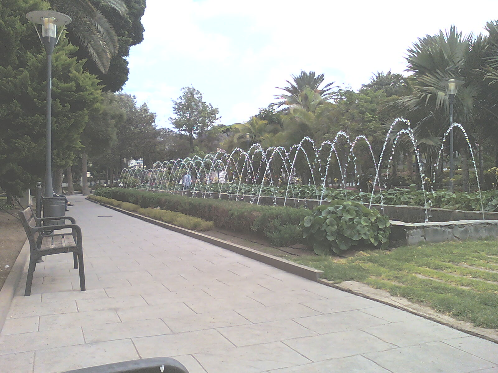 Interior del Parque Doramas en Las Palmas de Gran Canaria, fuente. Parte final izquierda si entras desde la parte superior.